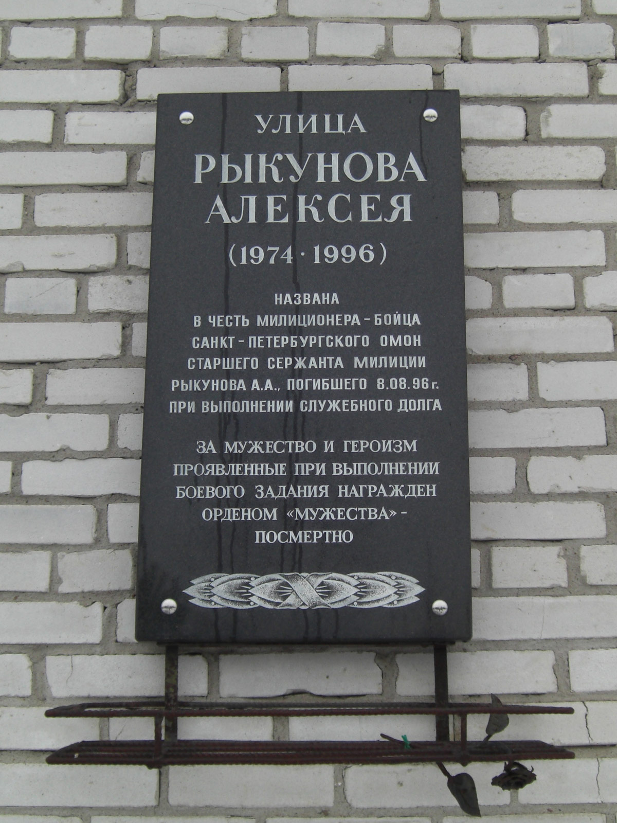 Мемориальная доска Алексею Рыкунову в деревне Шпаньково Гатчинского района Ленинградской области